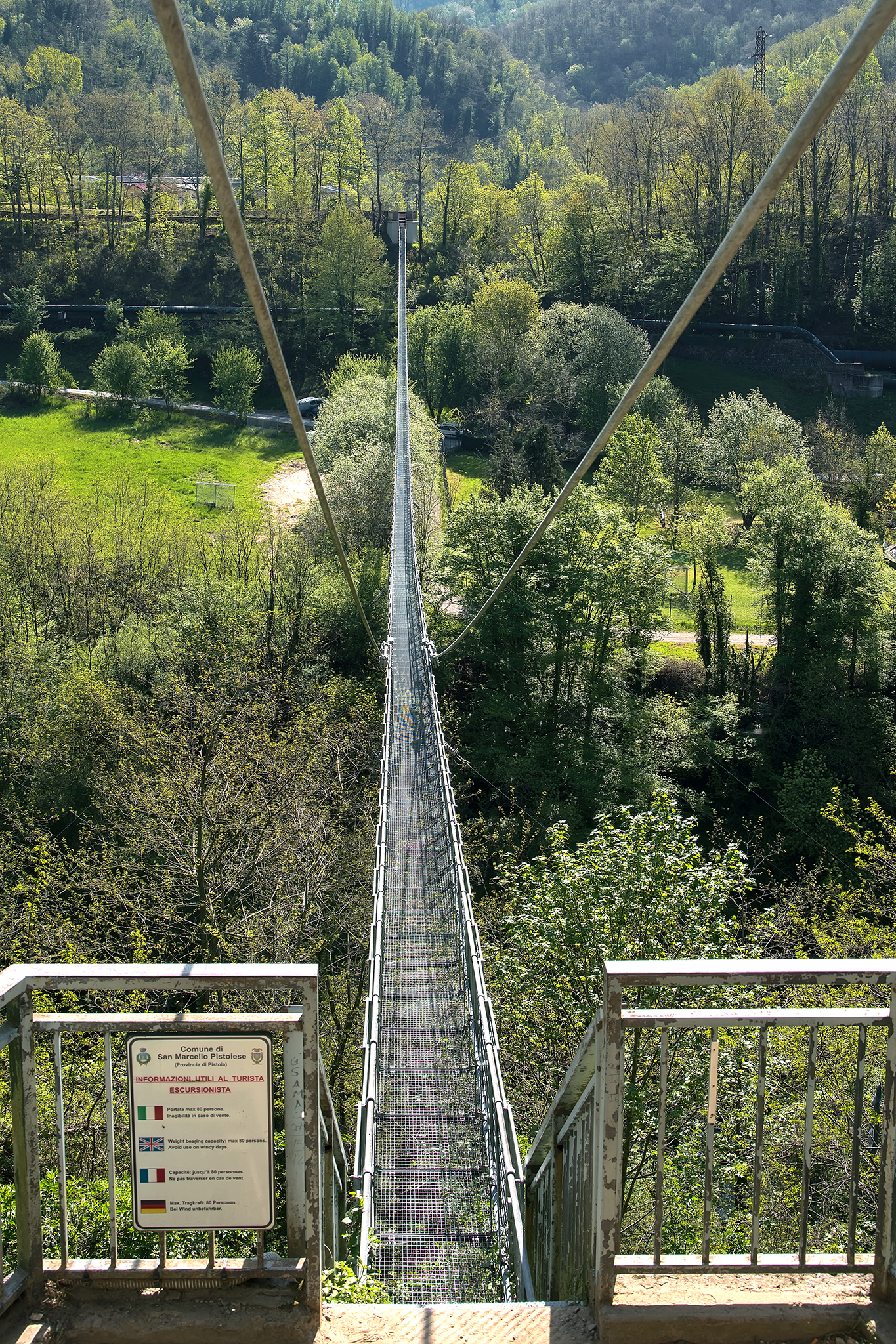 Ponte sospeso di San Marcello Piteglio This is a photo of a monument which is part of cultural heritage of Italy.